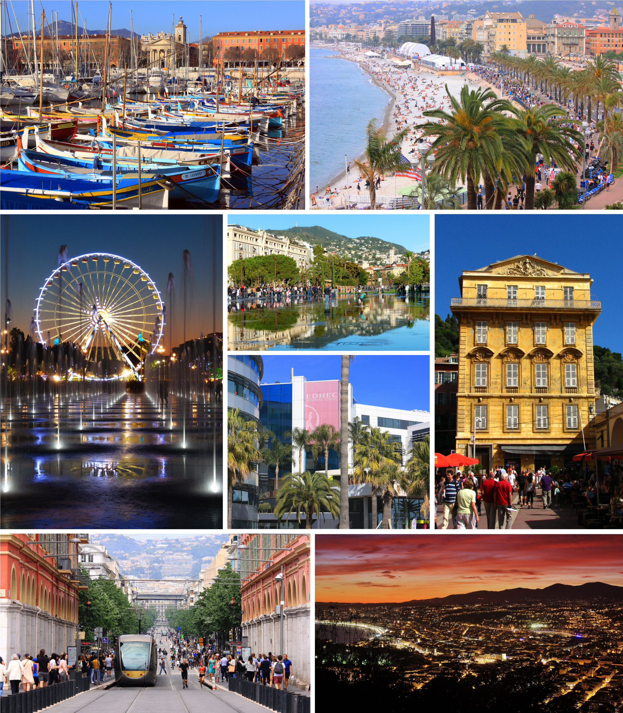 De gauche à droite et de haut en bas : le port, une vue depuis la colline du château, la grande roue, la Promenade du Paillon, une école près du quartier d'affaire, une maison du Cours Saleya, une avenue commerçante, une vue depuis le Mont-Boron.